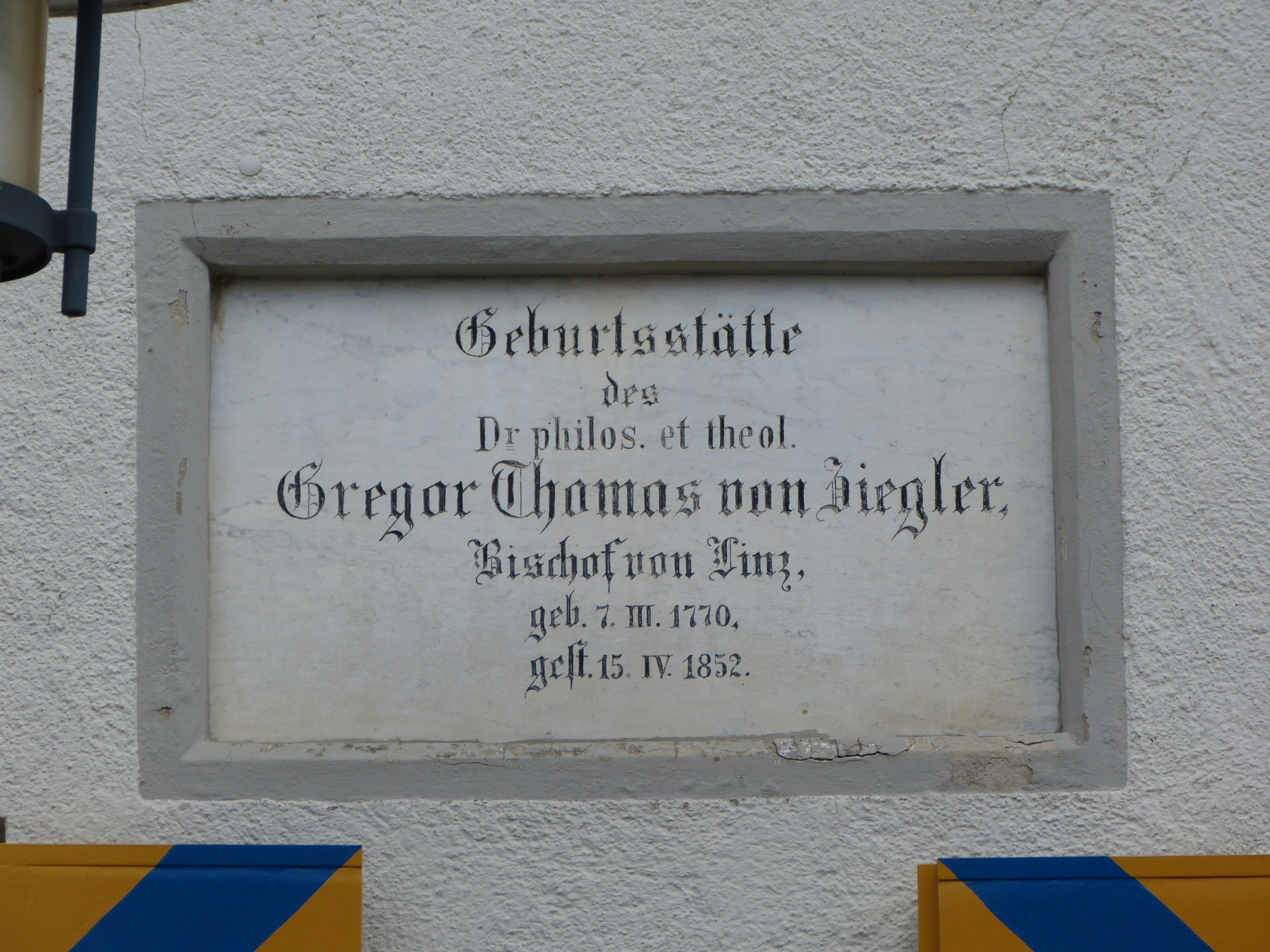 Ehemaliges Amtsgebäude und Wohnhaus, Kirchheim in Schwaben, Landkreis Unterallgäu, Bayern